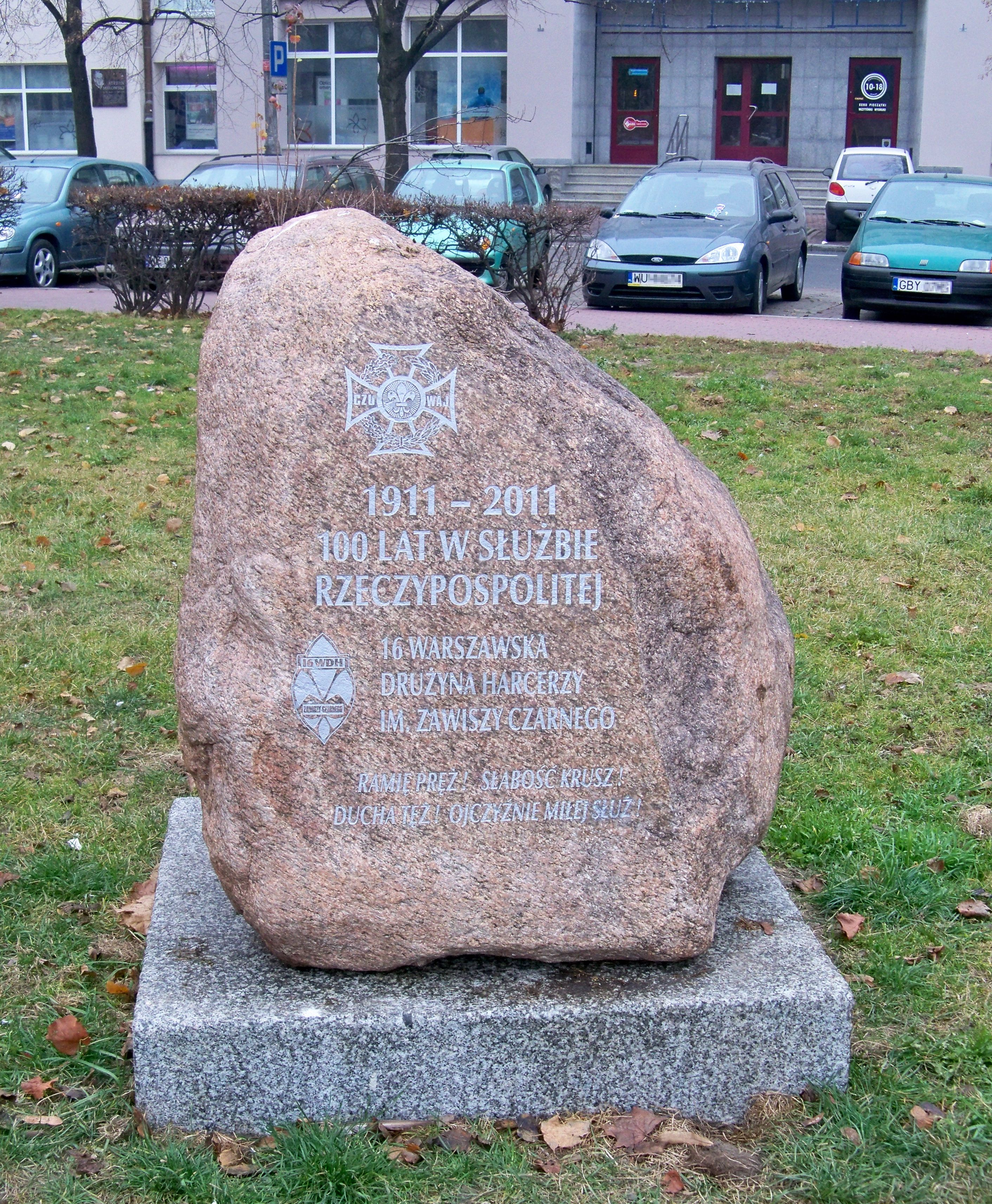 Głaz upamiętniający stulecie 16 Warszawskiej Drużyny Harcerzy im. Zawiszy Czarnego (obecnie Związek Harcerstwa Rzeczypospolitej)